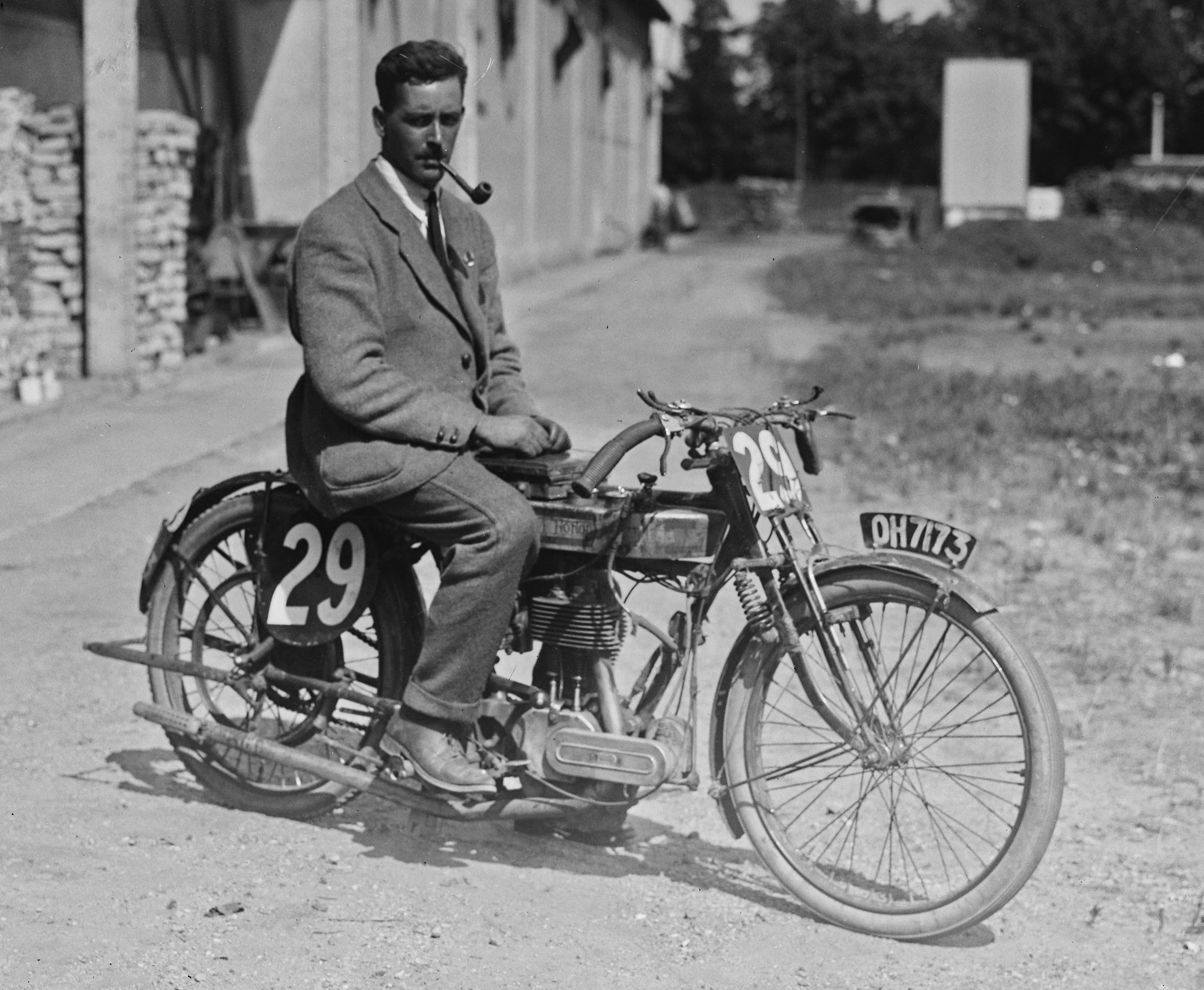 Pesage du Grand prix de la Sarthe, Walcker [i. e. Graham Walker] sur Norton [grand prix des motocyclettes, pesage aux usines Bollée du Mans].